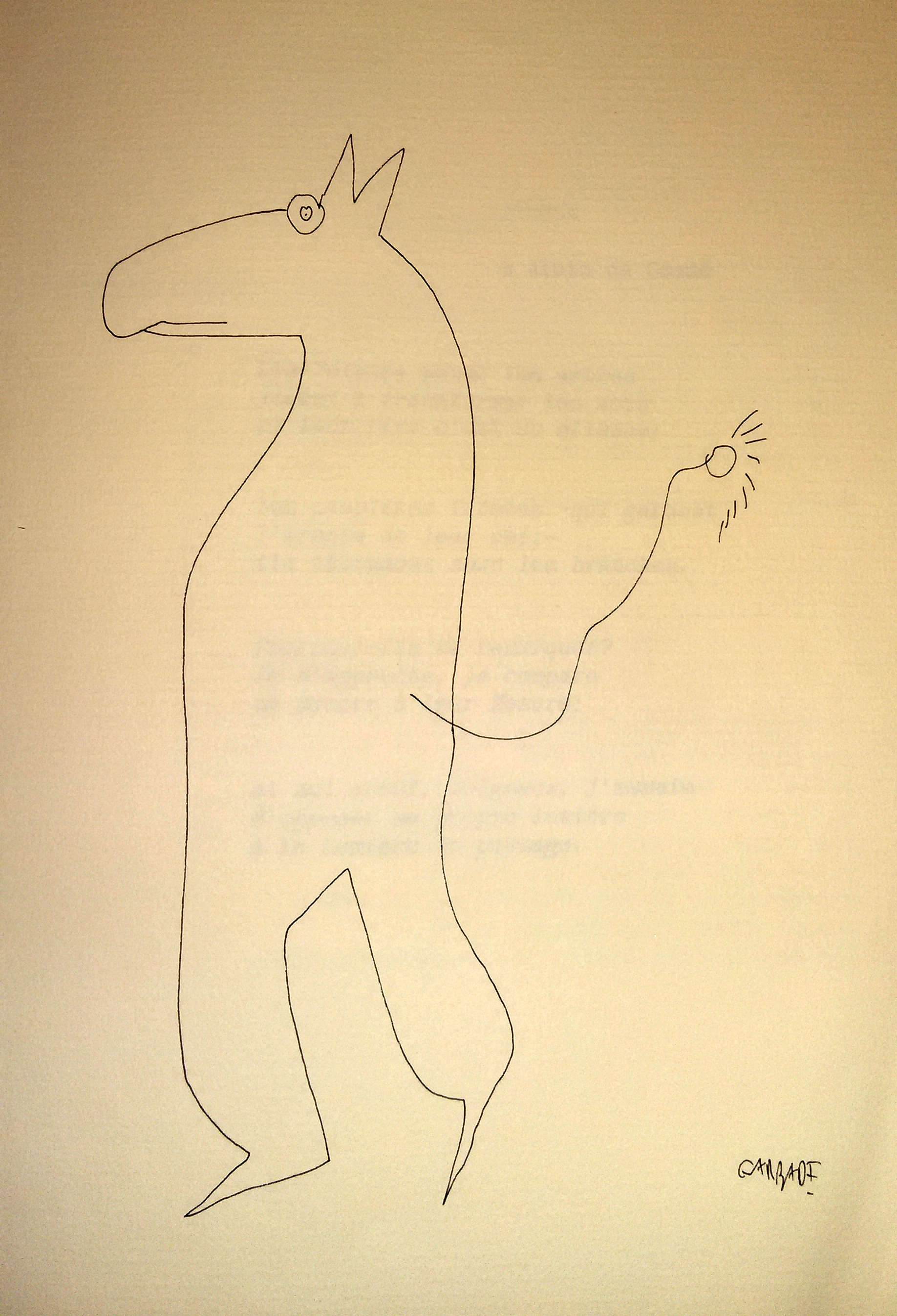 Dibujo original de Daniel Garbade en la revista Signos,no 1: Virgo